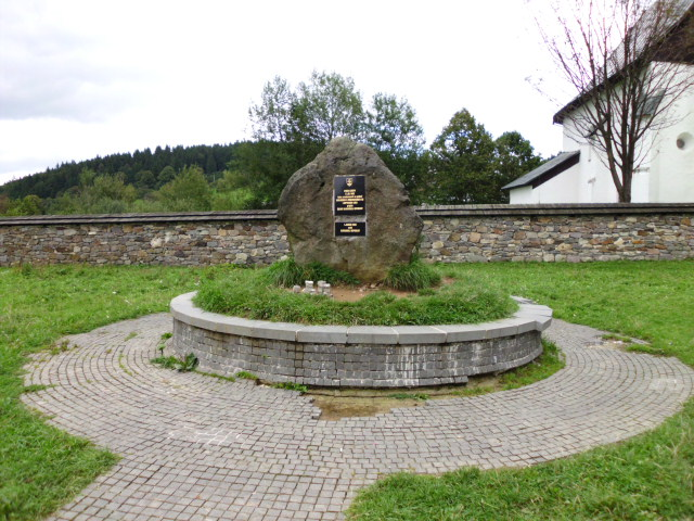 Der Hinweisstein auf die Mitte Europas in Kremnice Bane